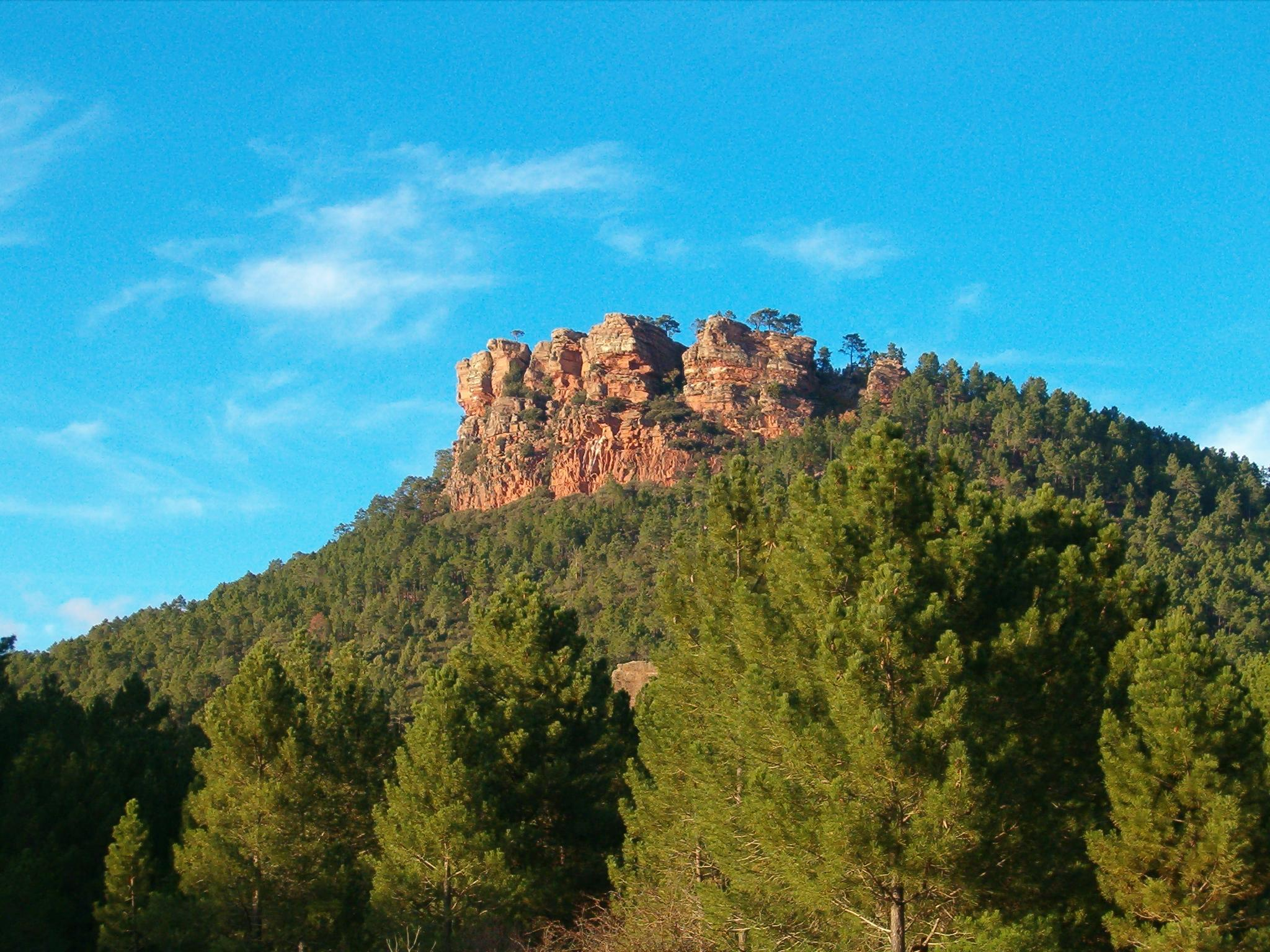 LA TABARREÑA